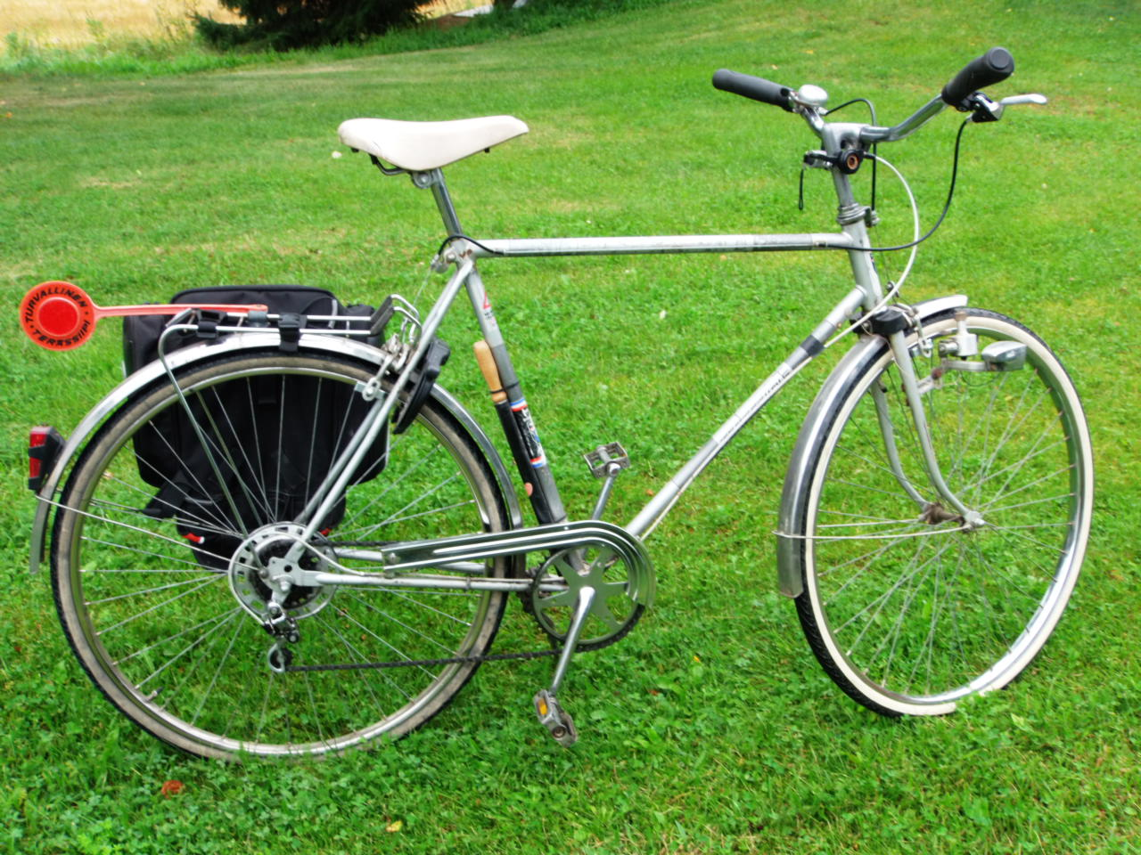 Terässiipi merkkinen miesten retkipyörä